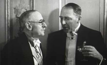 Извънредният пратеник и пълномощен министър в Лондон Симеон Радев със съветника в Германското посолство д-р Вьорман на официална вечеря, 1935 г.